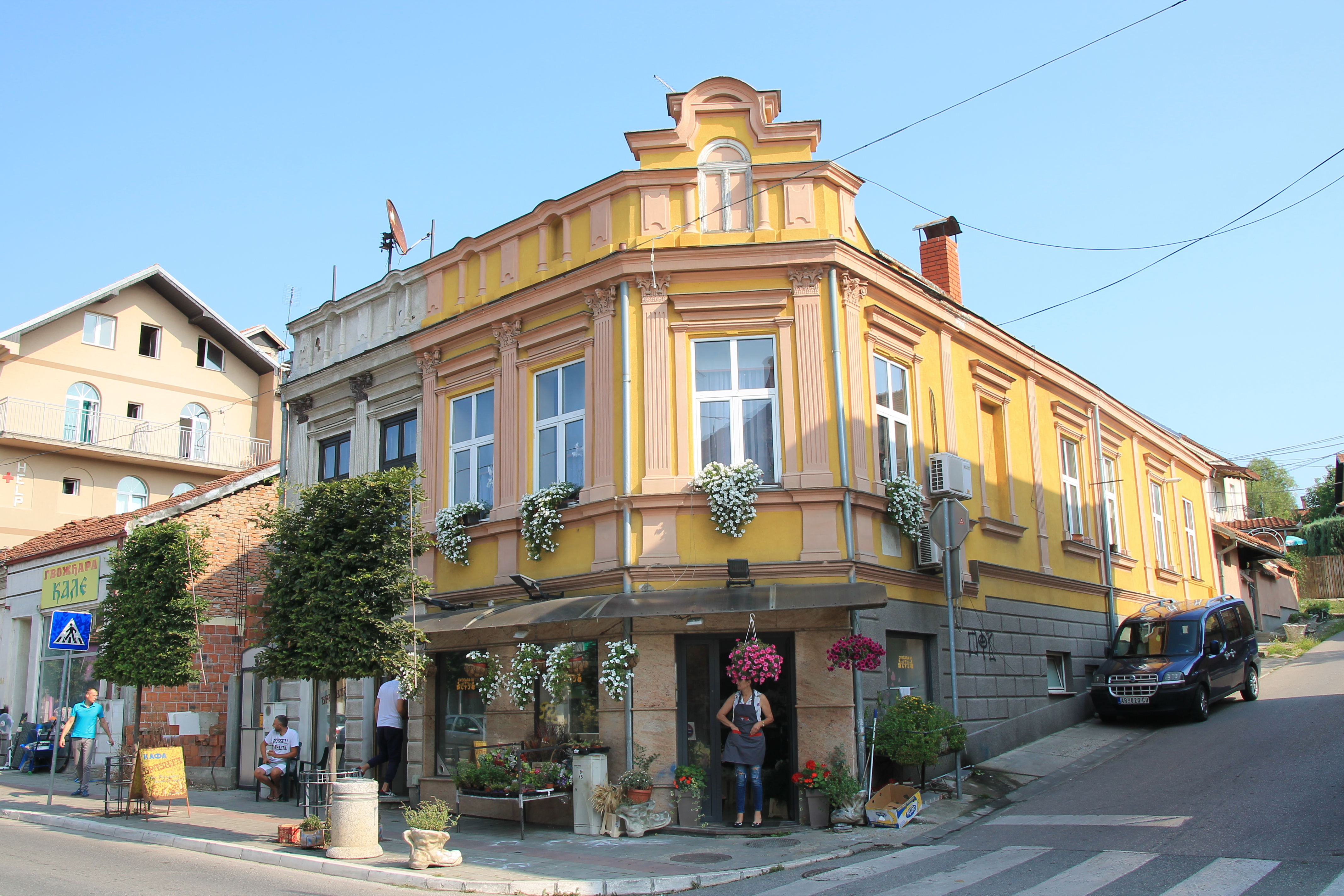 Kuća Knjaza Miloša 22